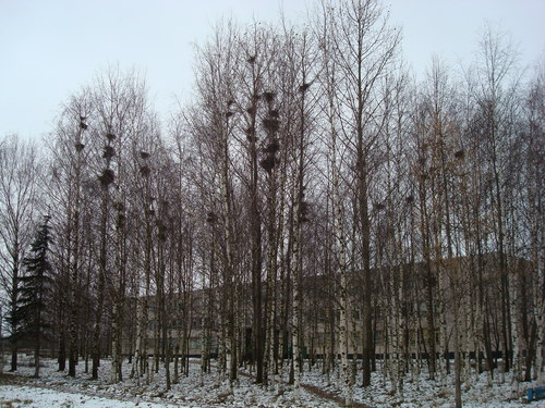 Escuela de Shaburnovo, fotografiada en invierno.